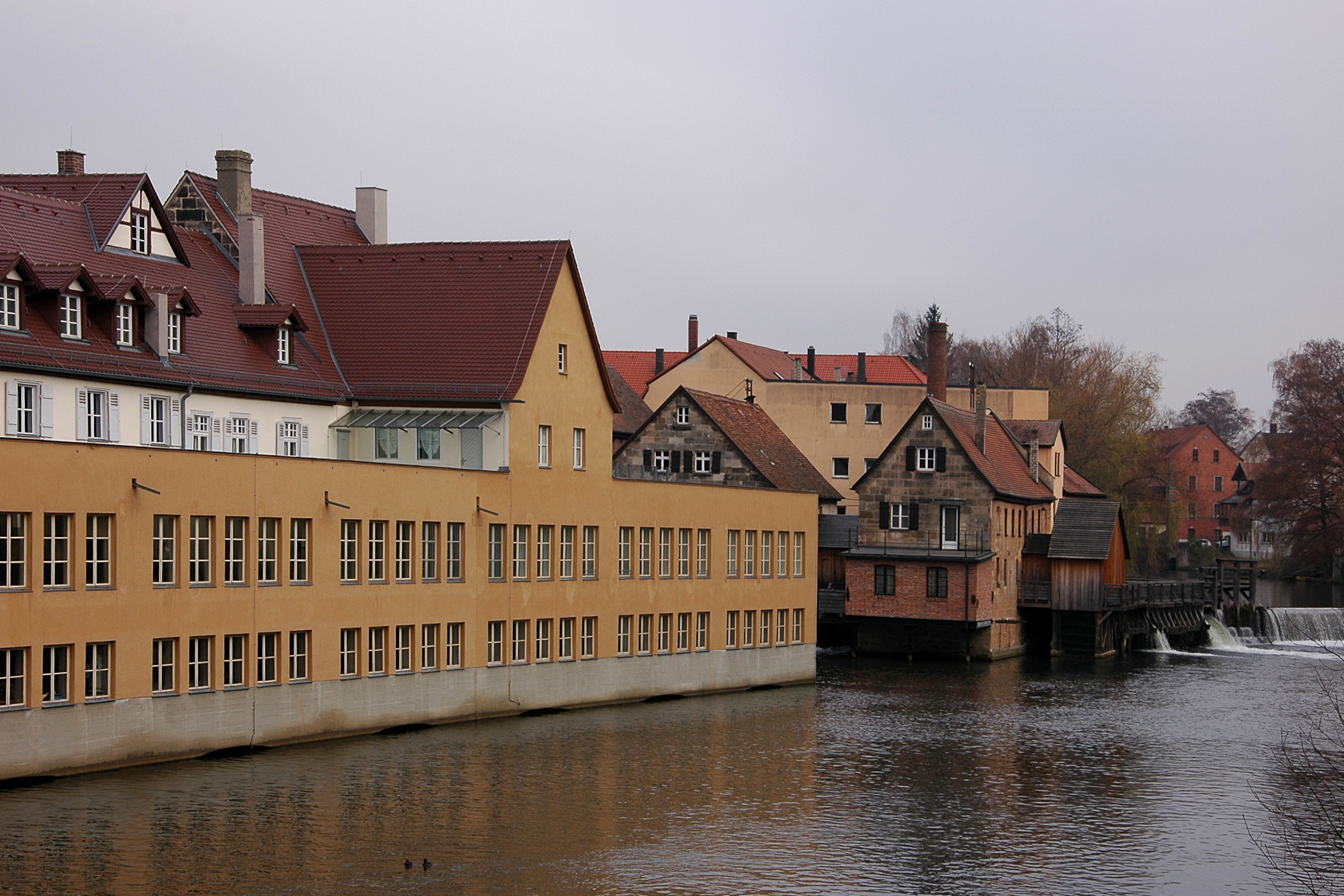 Gebäude des Industriemuseums Lauf an der Pegnitz: Links vorne ein Teil der ehemaligen Ventilfabrik Dietz & Pfriem. Das linke Sandsteingebäude weiter hinten beherbergt eine betriebsfähige Getreidemühle, im Sandsteingebäude rechts davon befindet sich u.a. eine ebenfalls betriebsfähige Schmiede, ein kleines E-Werk, sowie ein historischer Frisiersalon, eine Hutwerkstatt sowie Betriebswohnungen verschiedener Epochen.